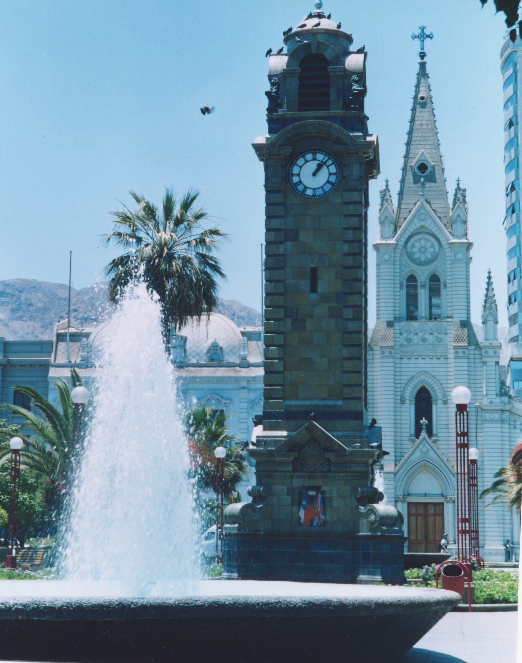 Plaza Colón. Antofagasta, Chile.